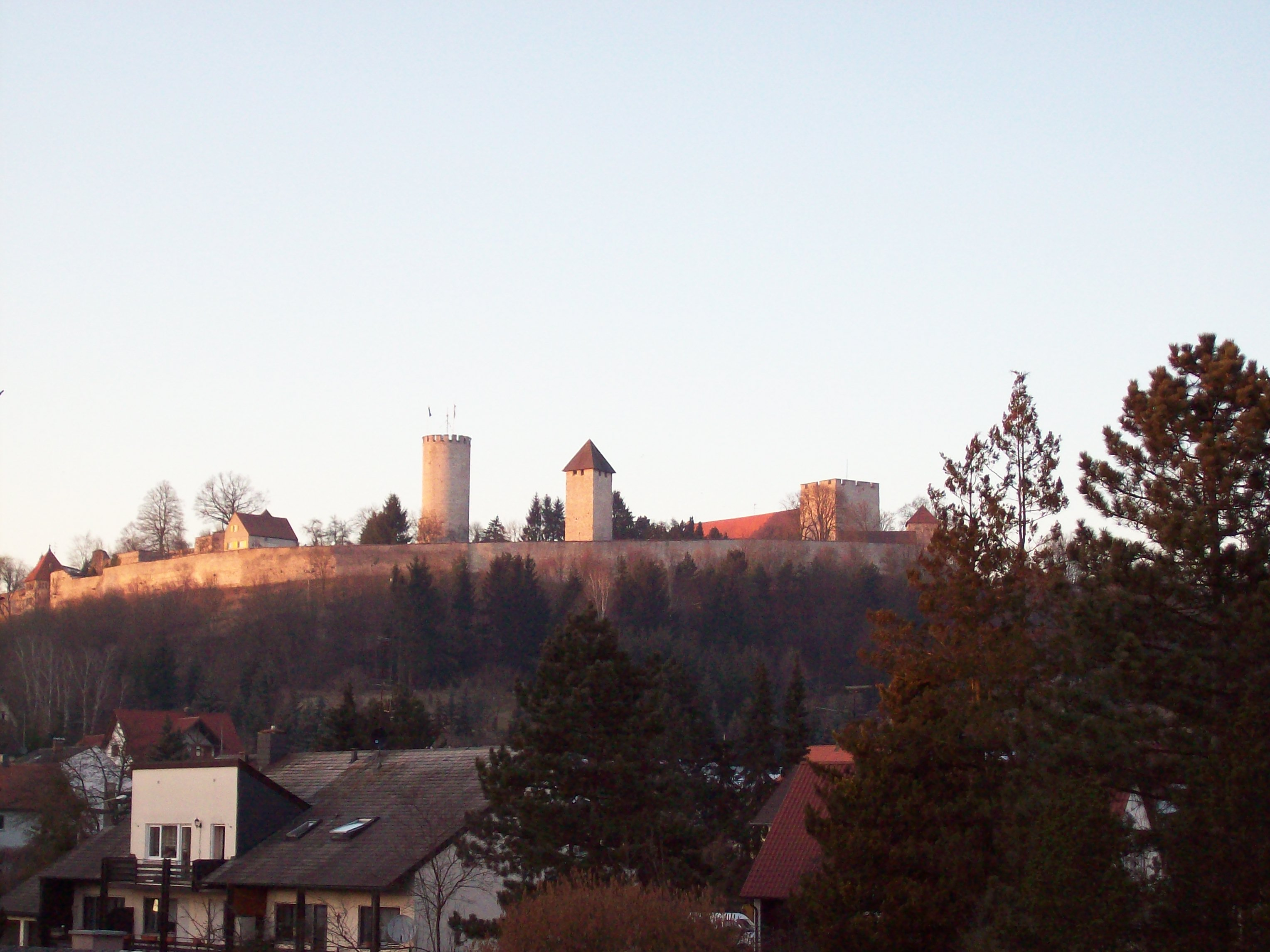 Sicht auf die Burglengenfelder Burg.